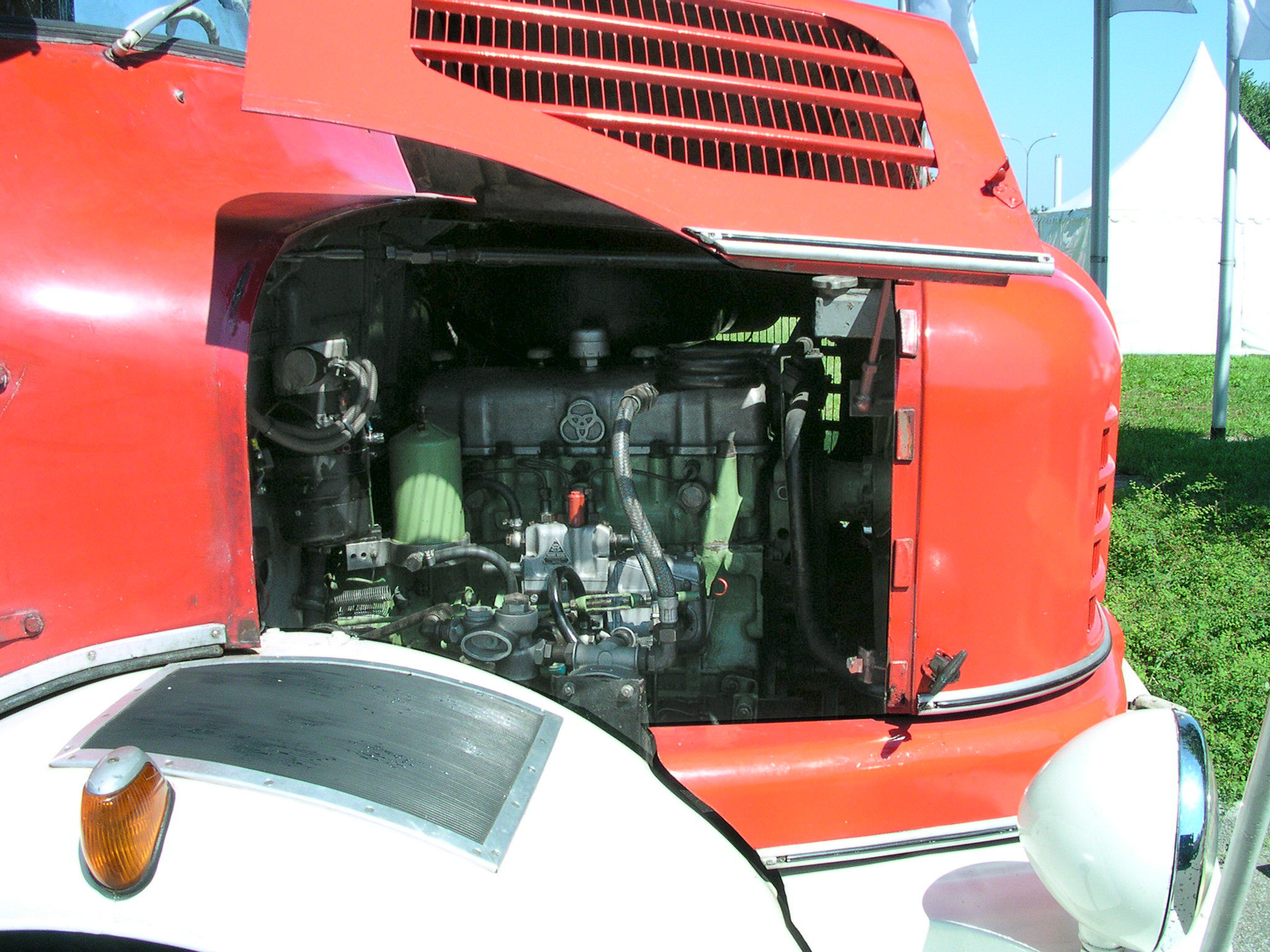 Krupp Elch Feuerwehr aus Essen in Wörth am Rhein beim Oldtimer-Treffen bei Daimler-Chrysler